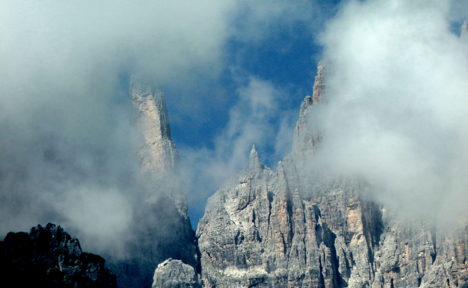 Dolomiti di Brenta (Q47501367)